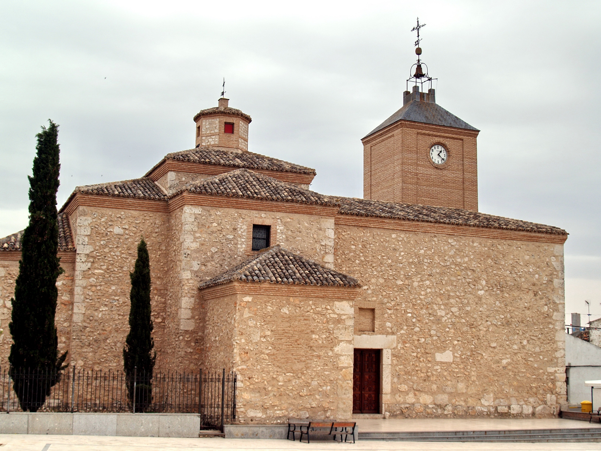 Ermita de María Magdalena en Noblejas